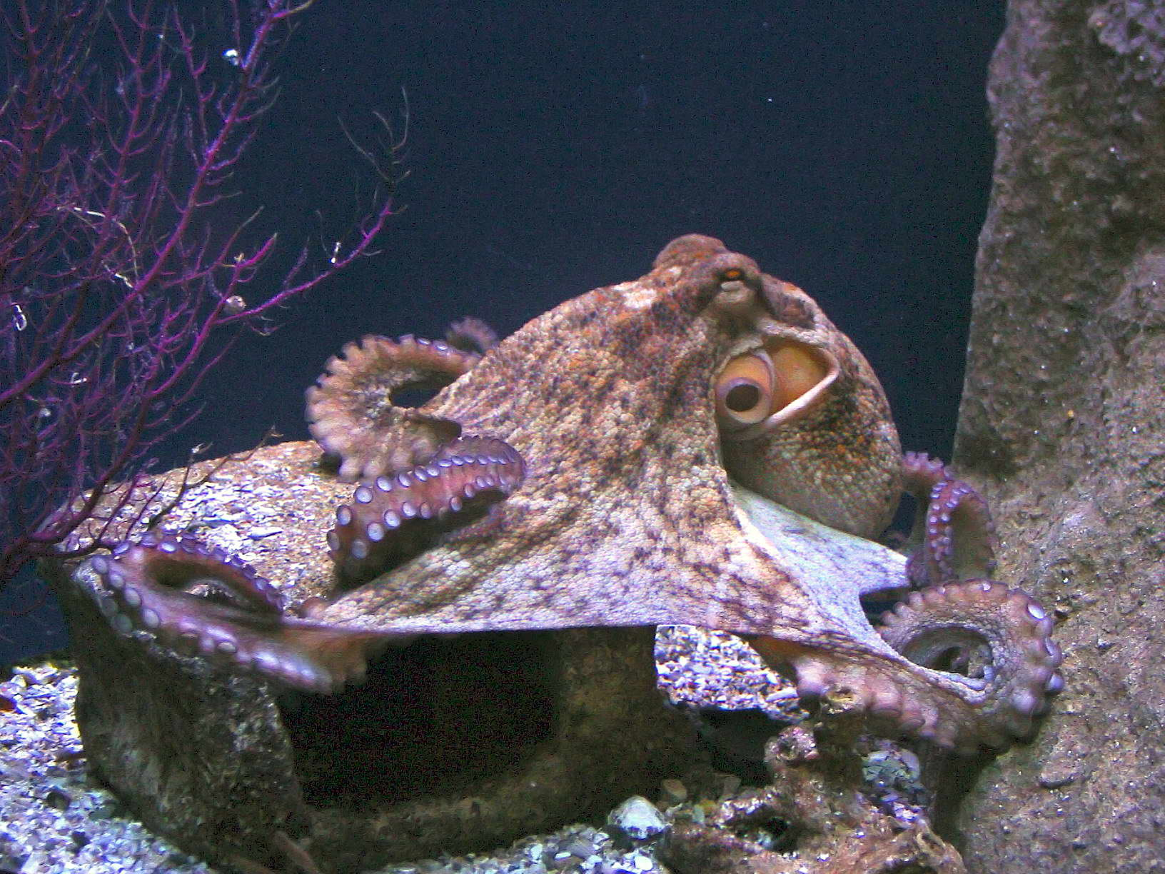 self made